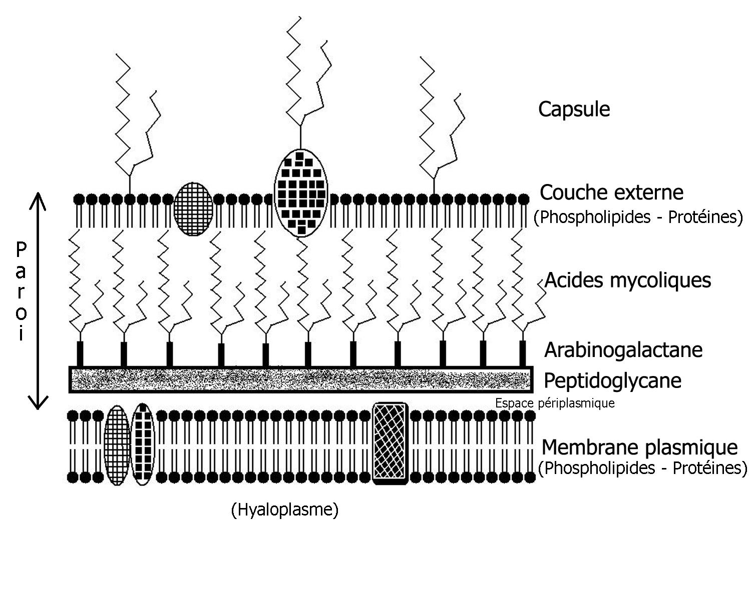 Schéma (très moche, oui, mais bon je suis pas graphiste :p) des caractéristiques d'enveloppe des mycobactéries ou BAAR (Bacilles Acido-Alcoolo-Résistants).